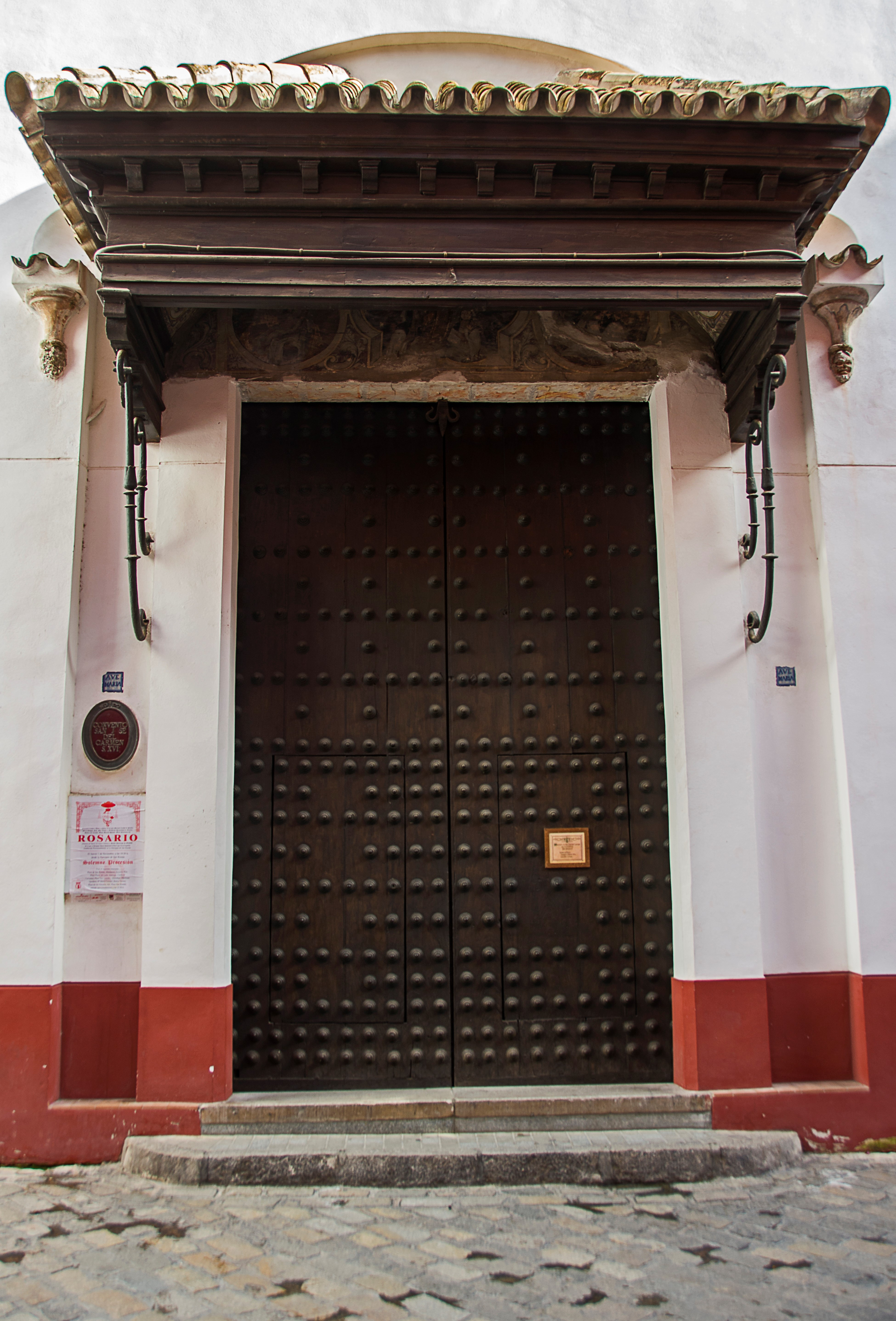 Portada de la iglesia del convento de las Teresas de Sevilla.